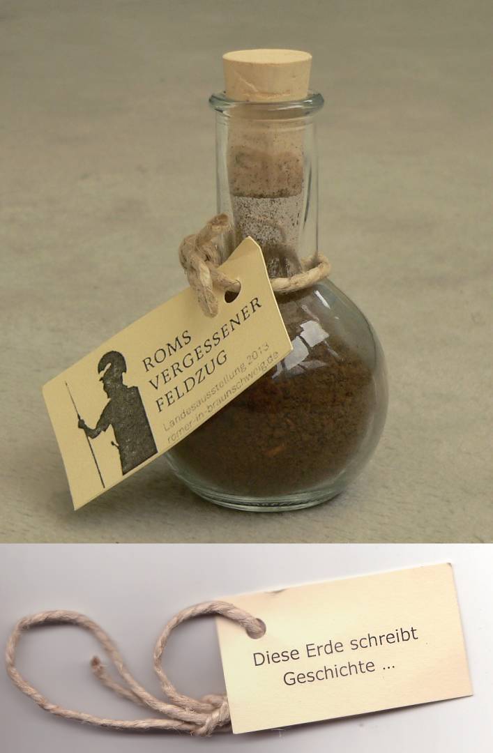 Werbeflasche zur Landesausstellung im Braunschweigischen Landesmuseum "Roms vergessener Feldzug. Die Schlacht am Harzhorn".